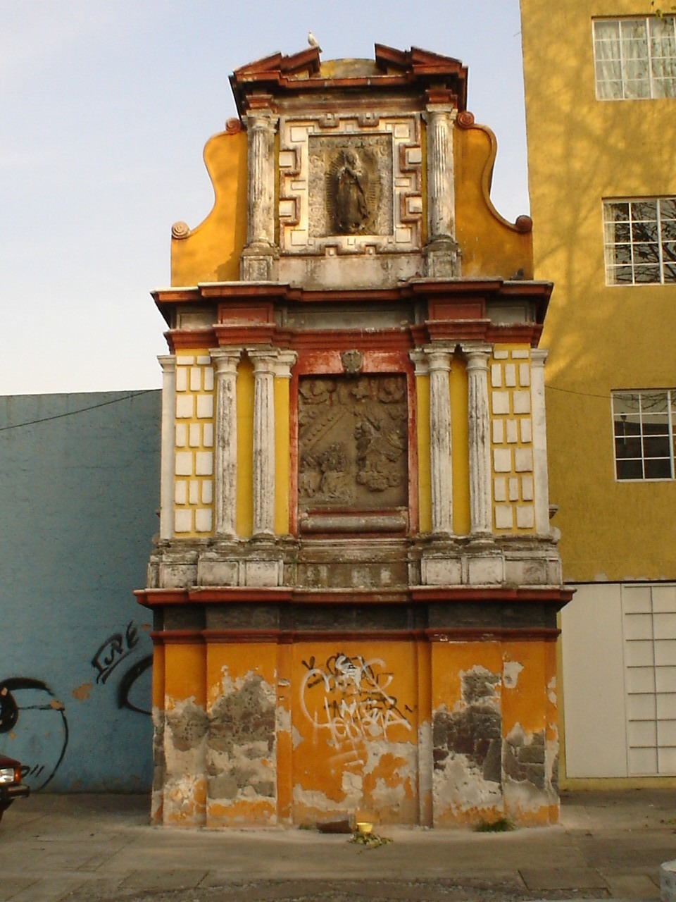 monumento a los misterios sobre la calzada de los misterios